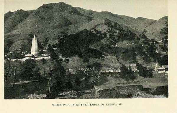 北京灵光寺招仙塔